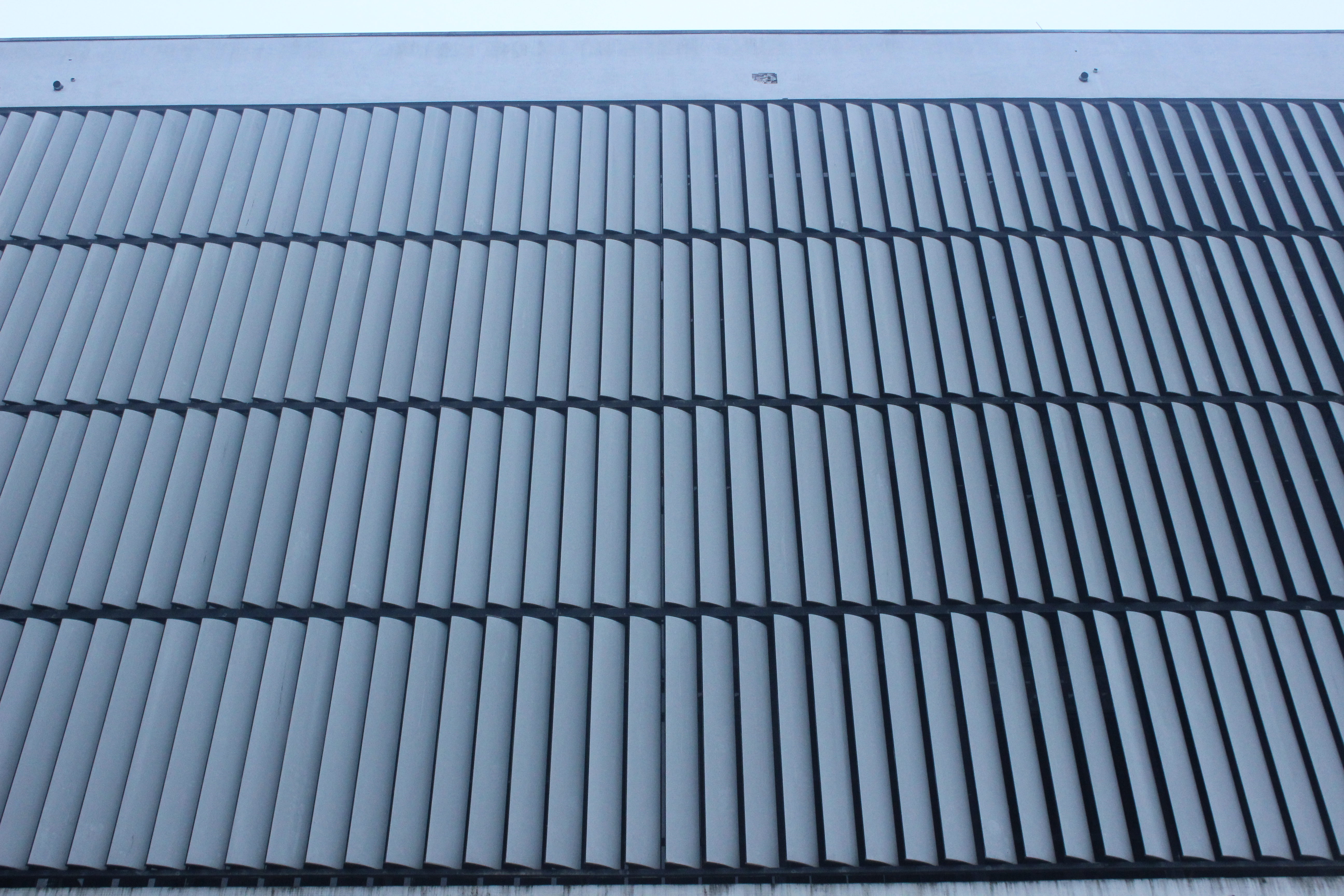 Prédio da Bienal de São Paulo, localizado no Parque do Ibirapuera, em São Paulo (SP)